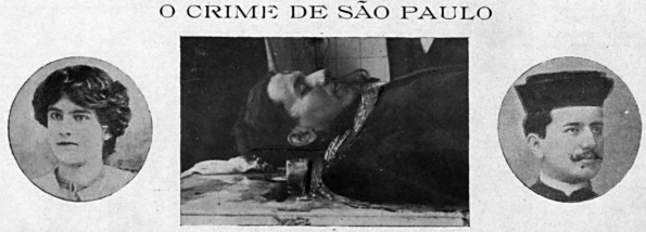 Montagem das fotos de Albertina Barbosa e de Arthur Malheiros da década de 1900, antes da morte de Arthur Malheiros que ocorreu em 1909. Fotos da Revista Careta, edição 40 de 1909.